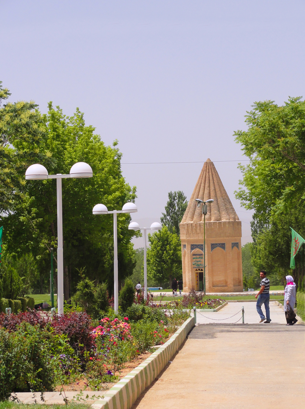 حیقوق نبی